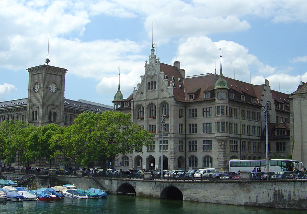 Das Stadthaus und die Fraumünsterpost in Zürich